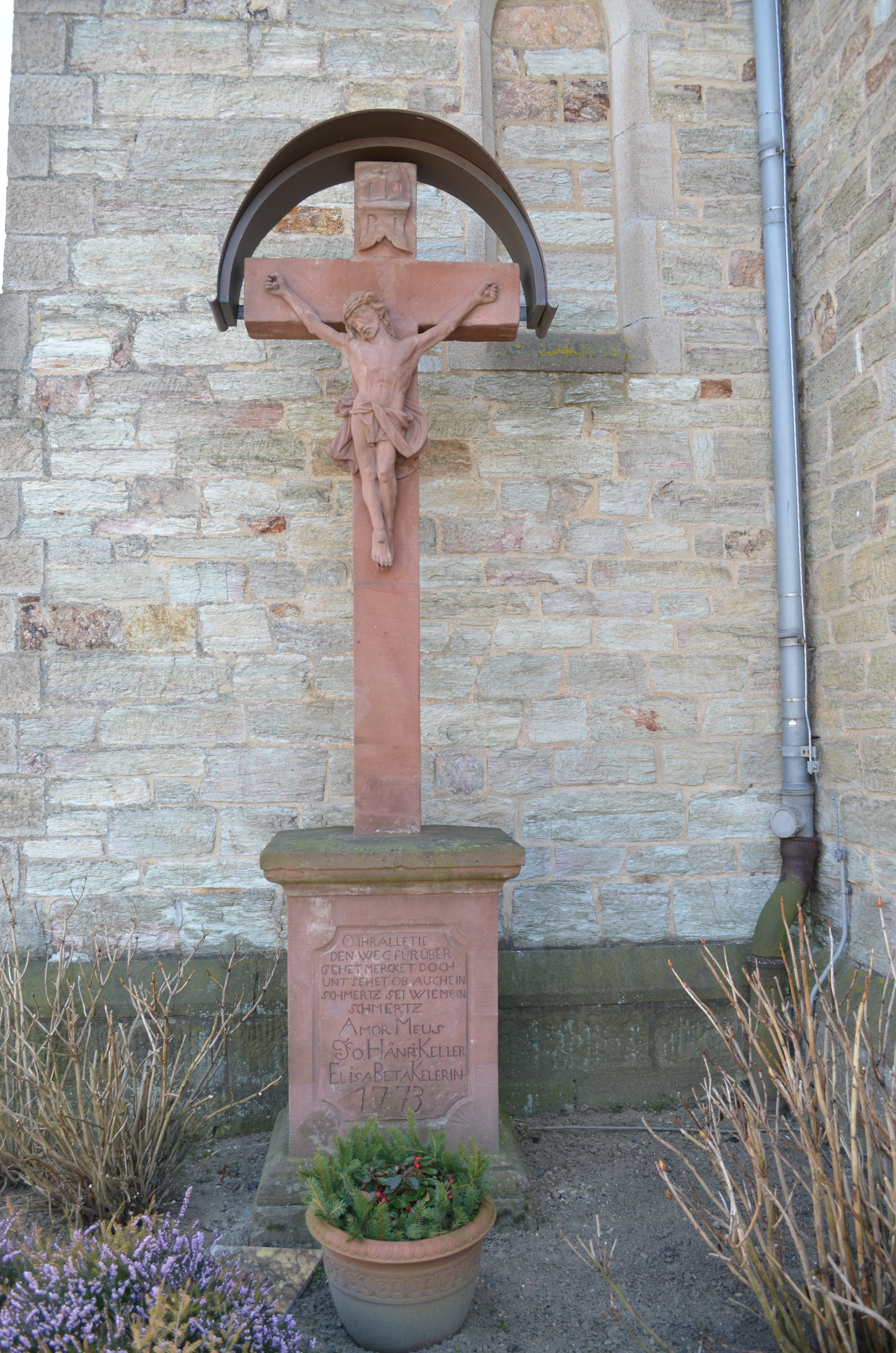 Bremthal, Katholische Kirche, Kreuz links neben dem Eingang